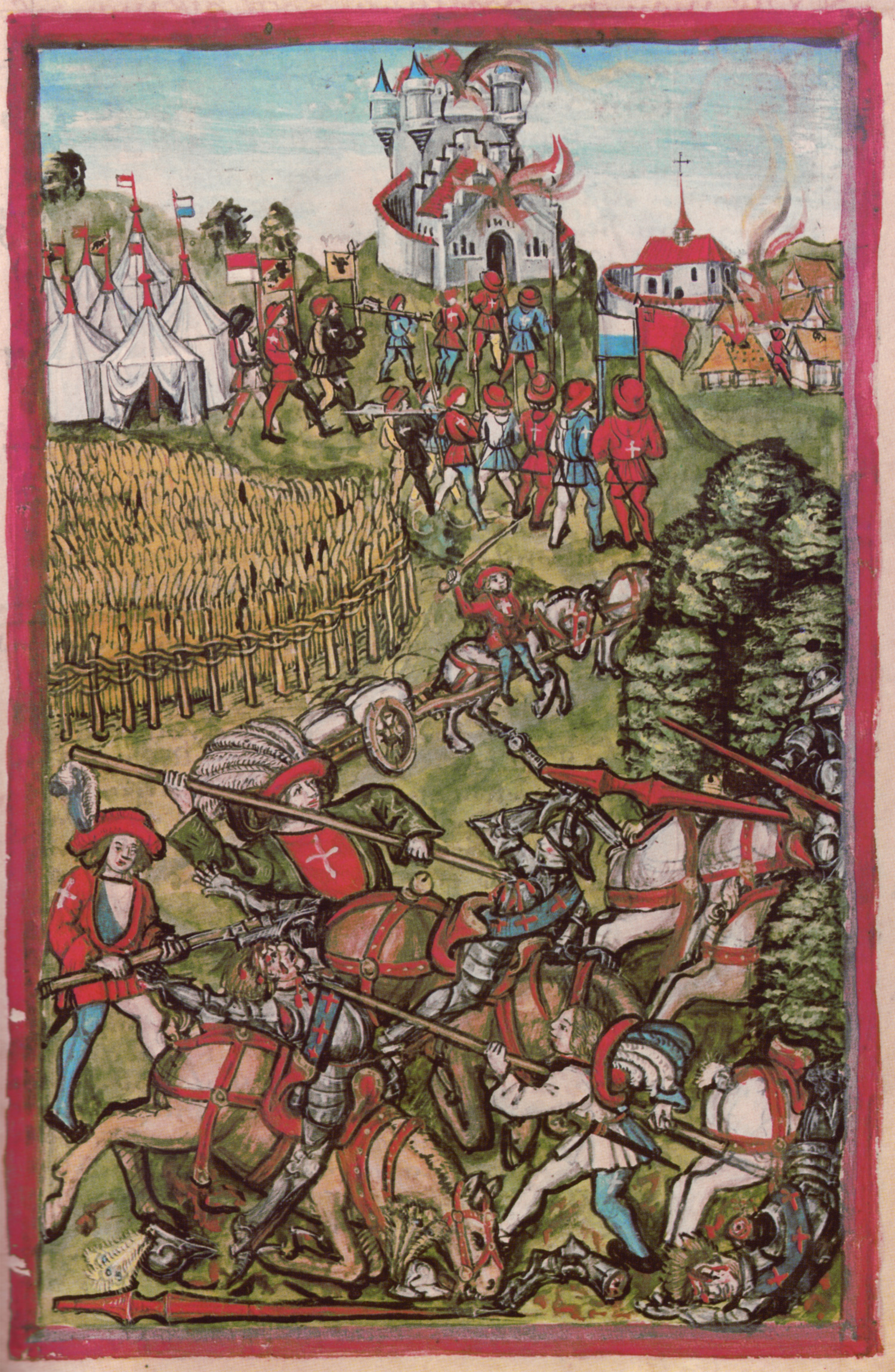 Darstellung der Kampfes auf dem Ochsenfeld, 6. Juli 1468 während des Sundgauerzuges der Eidgenossen, in der Luzerner Chronik des Diebold Schilling, Folio 75r